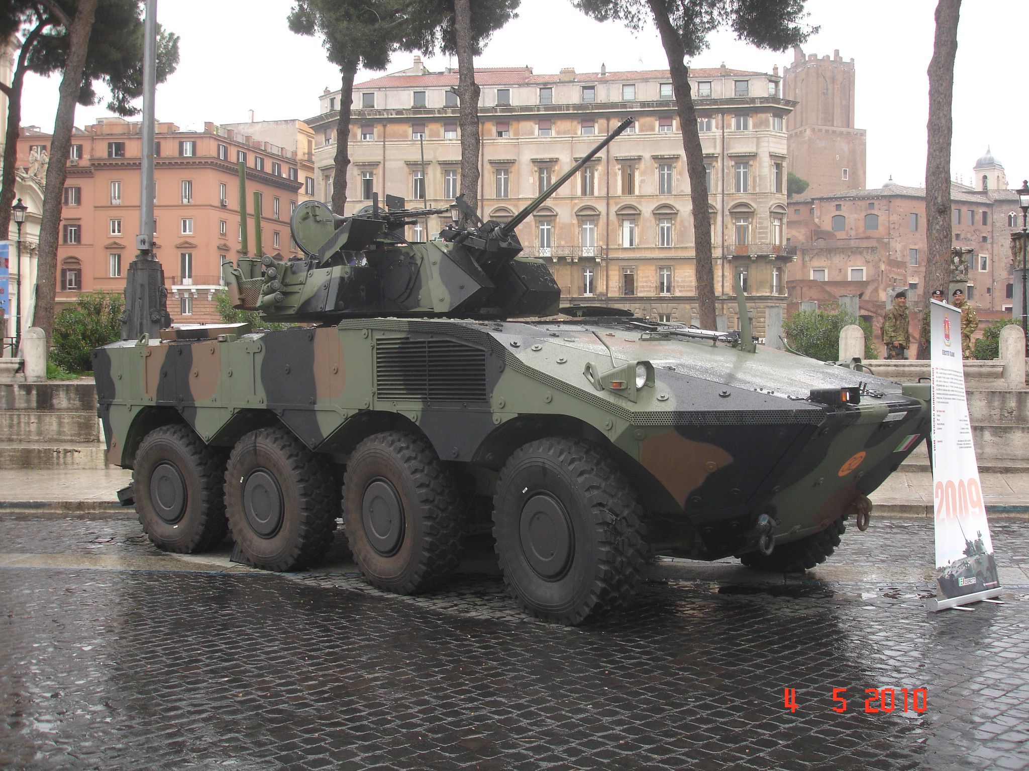 VBM Freccia fotografato a Roma in piazza Venezia nel Maggio 2010